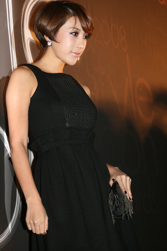 2008 스타일 아이콘 어워즈에서 서인영.